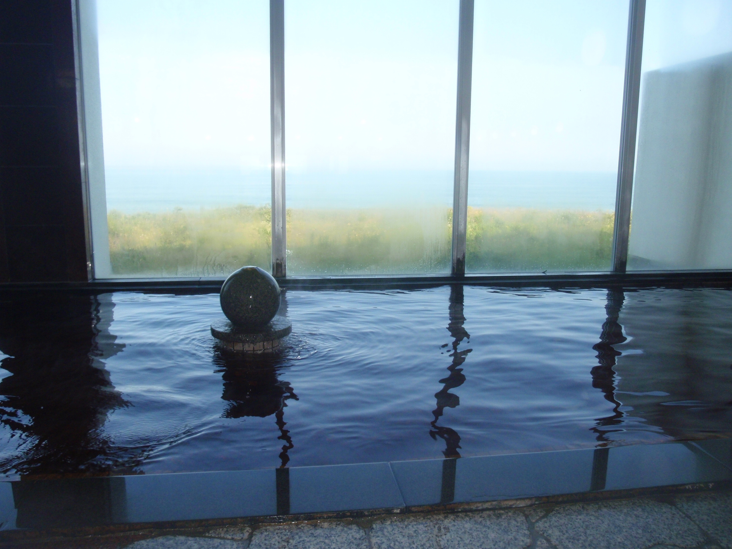 晩成温泉浴室